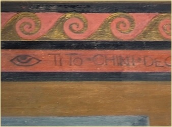 Particolare della firma di Tito Chini al Pasubio con occhio